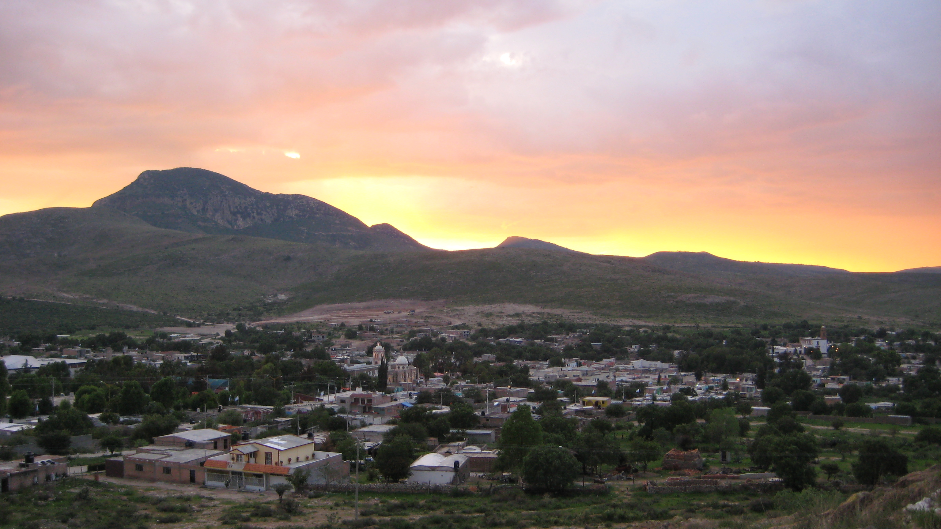 Atardecer en Real de Asientos.